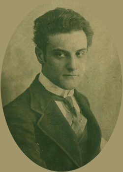 photo from Italian magazine La Vita Cinematografica, n.40-41, 1914.